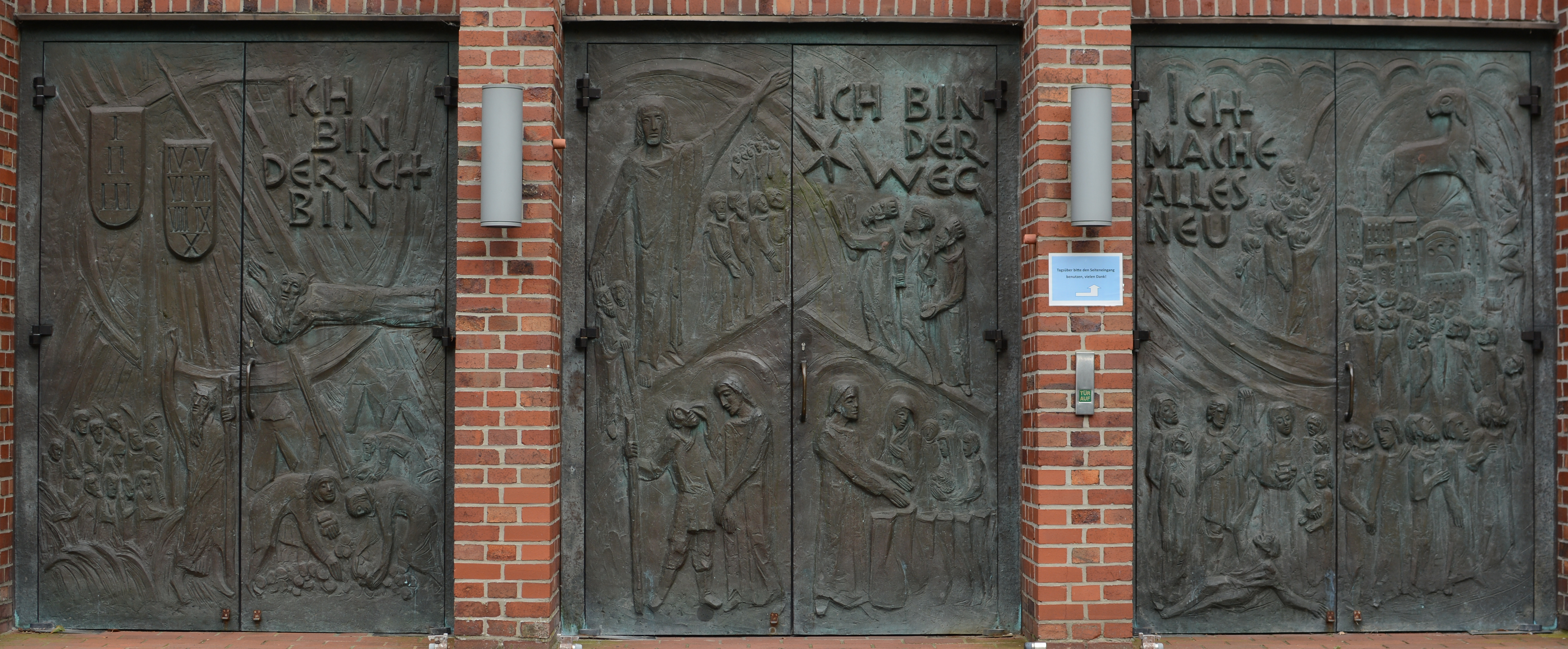 Die drei Bronzetüren von Maria Königin Lingen. Gestaltet von Joseph Krautwald (Rheine), am 22. Mai 1983 feierlich geweiht. Die Türen stellen das Erlösungswerk des dreifaltigen Gottes dar: Ich bin, der ich bin (2 Mos 3,14 EU) Ich bin der Weg (Joh 14,6 EU) Ich mache alles neu (Off 21,5 EU)